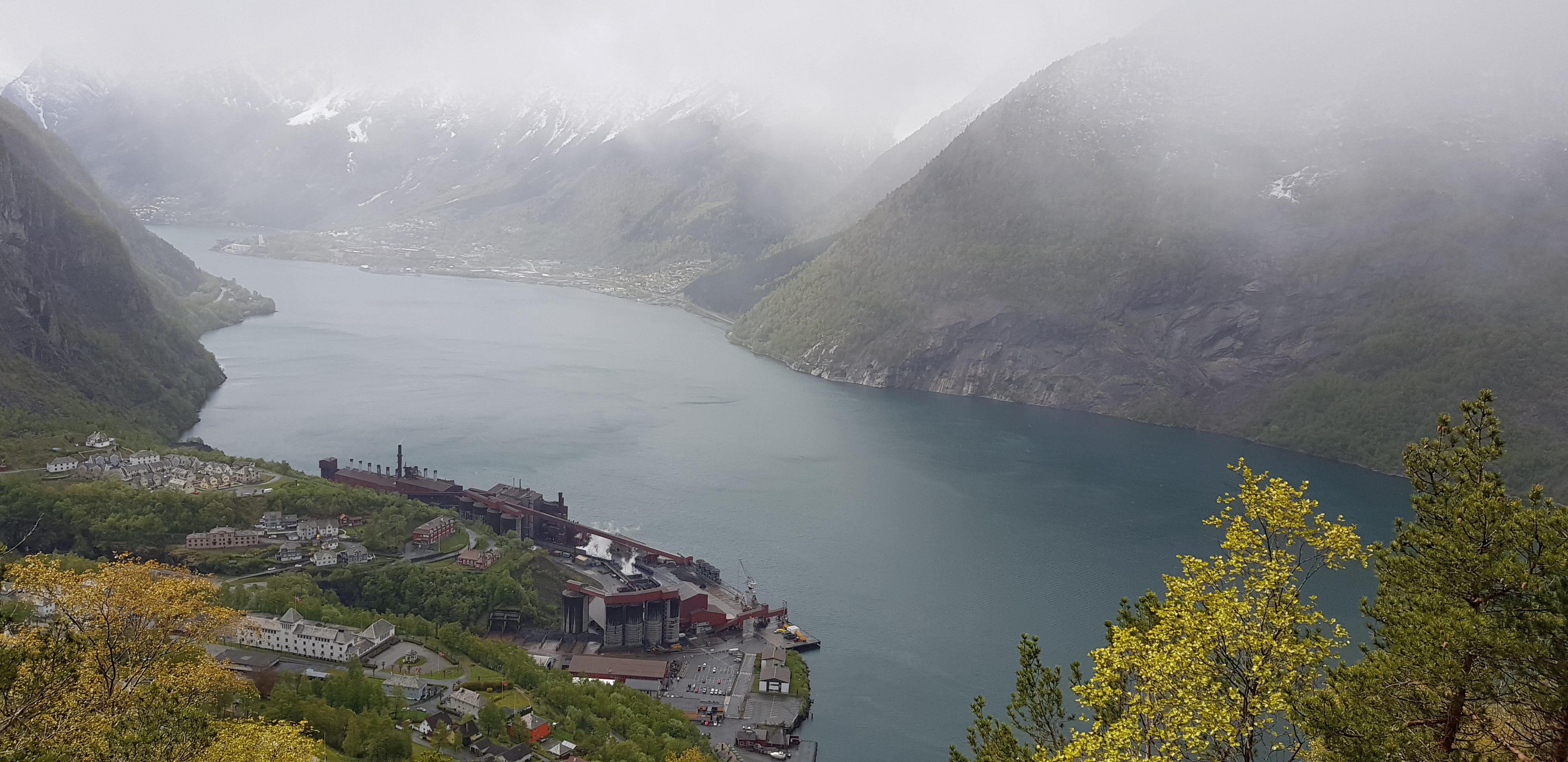 Smelteverket til TTI sett fra Mågeli.